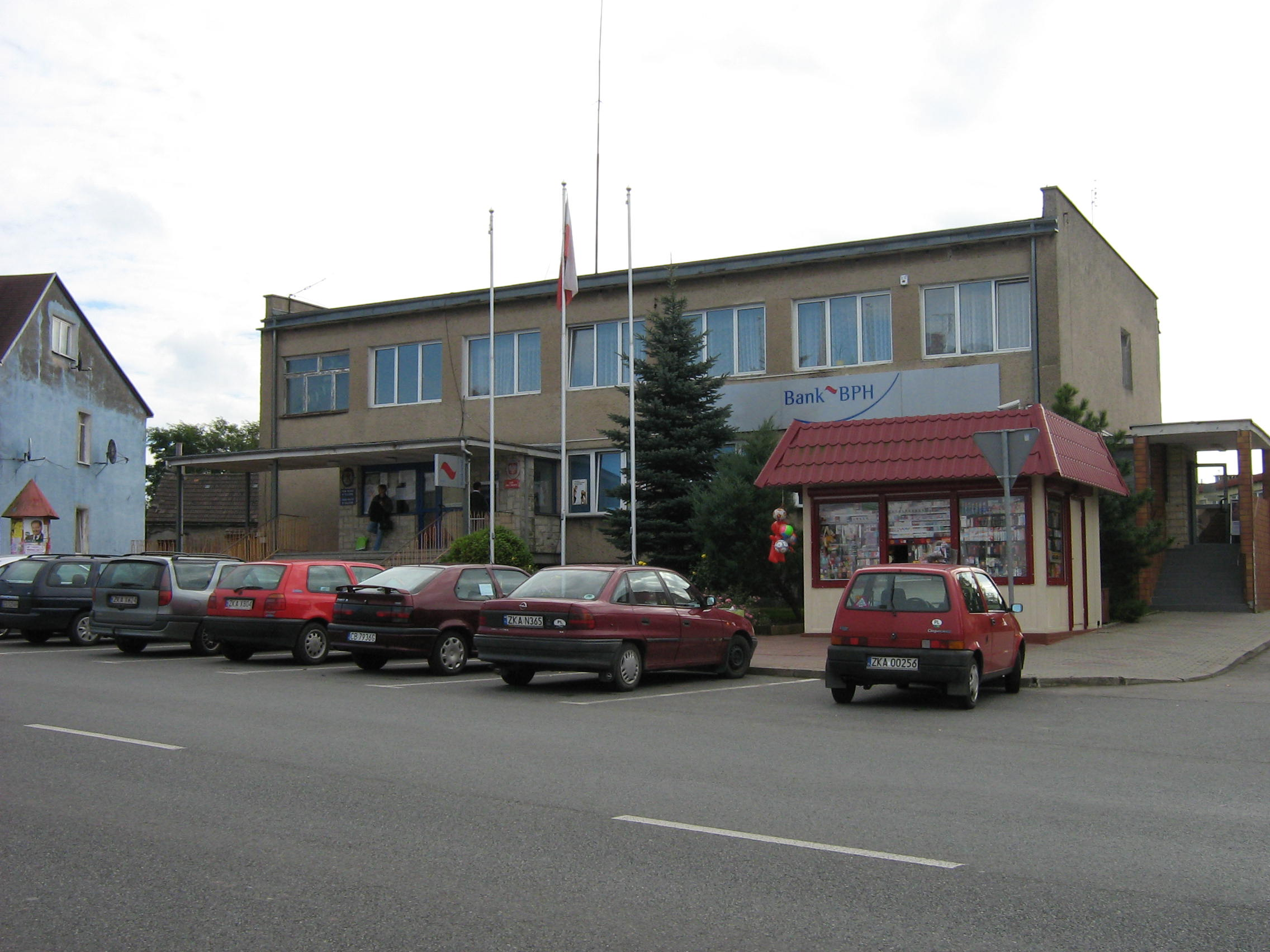 Urząd Miast w Golczewie